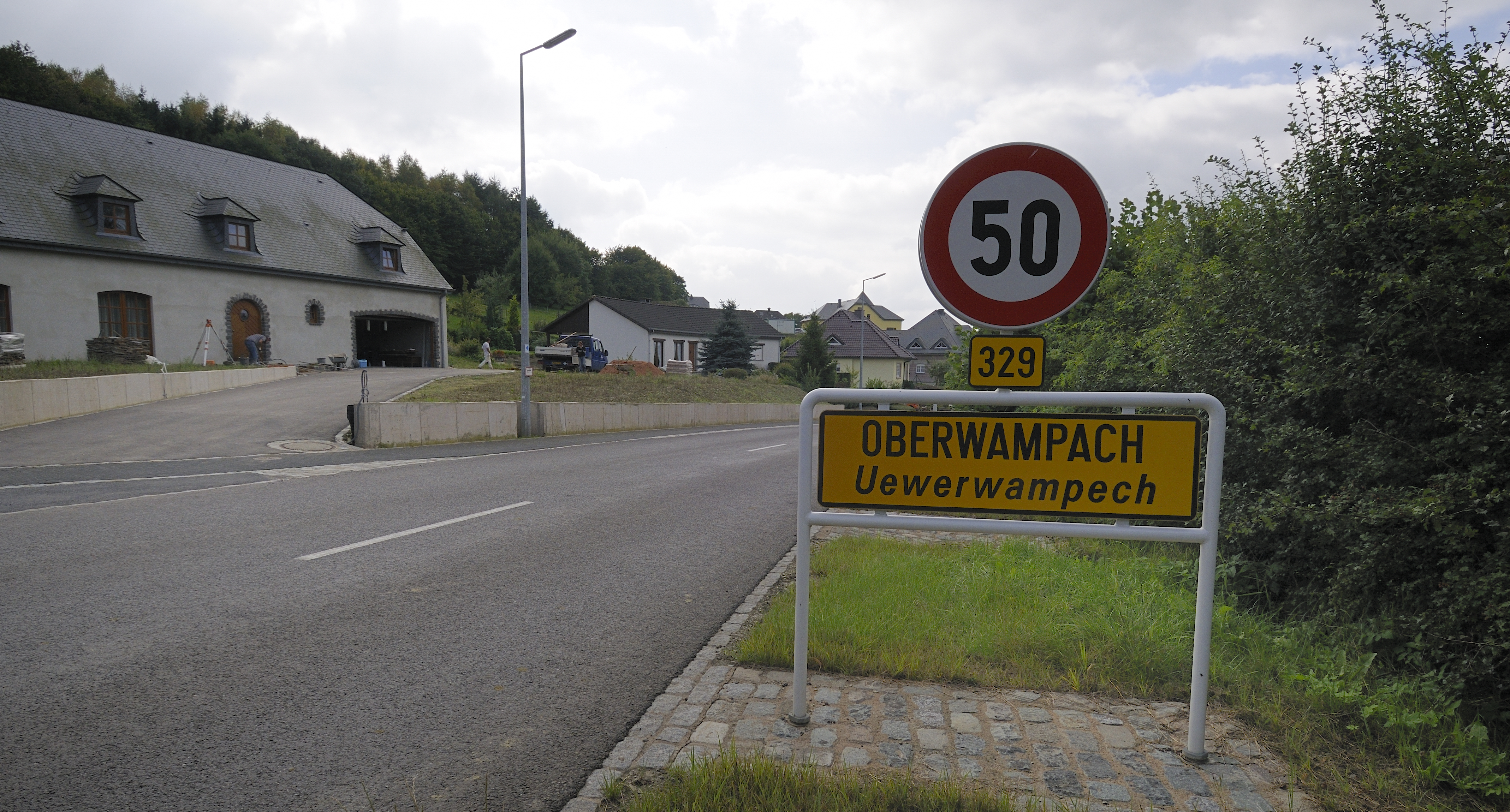 Uewerwampech.